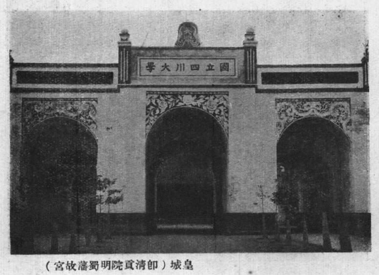 鄭璧成著四川導遊插圖